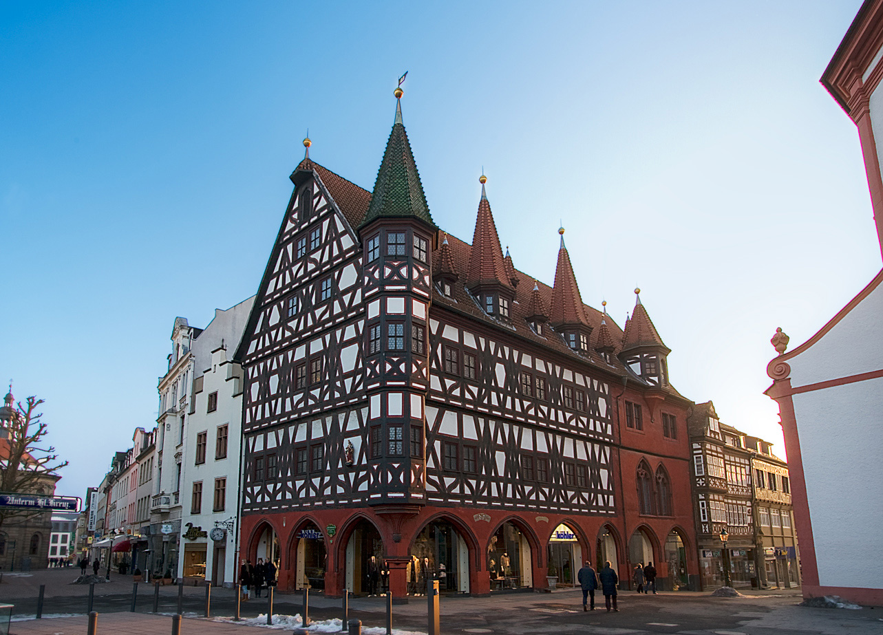 Altes Rathaus in Fulda (Rekonstruktion des Aussehens von 1531)